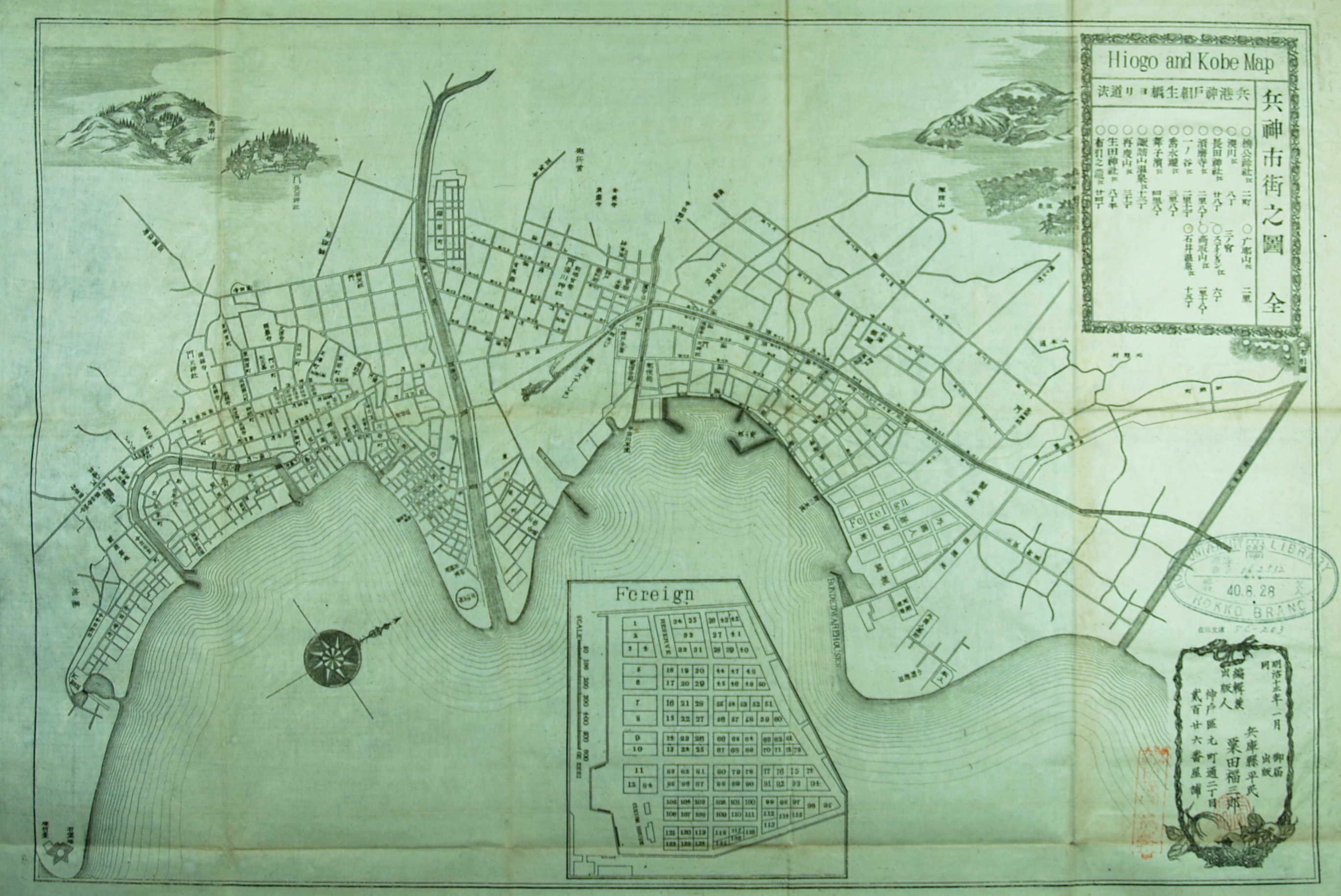 兵神市街の図 Licensing This work is in the public domain in its country of origin and other countries and areas where the copyright term is the author's life plus 50 years or less. This work is in the public domain in the United States because it was published (or registered with the U.S. Copyright Office) before January 1, 1923.